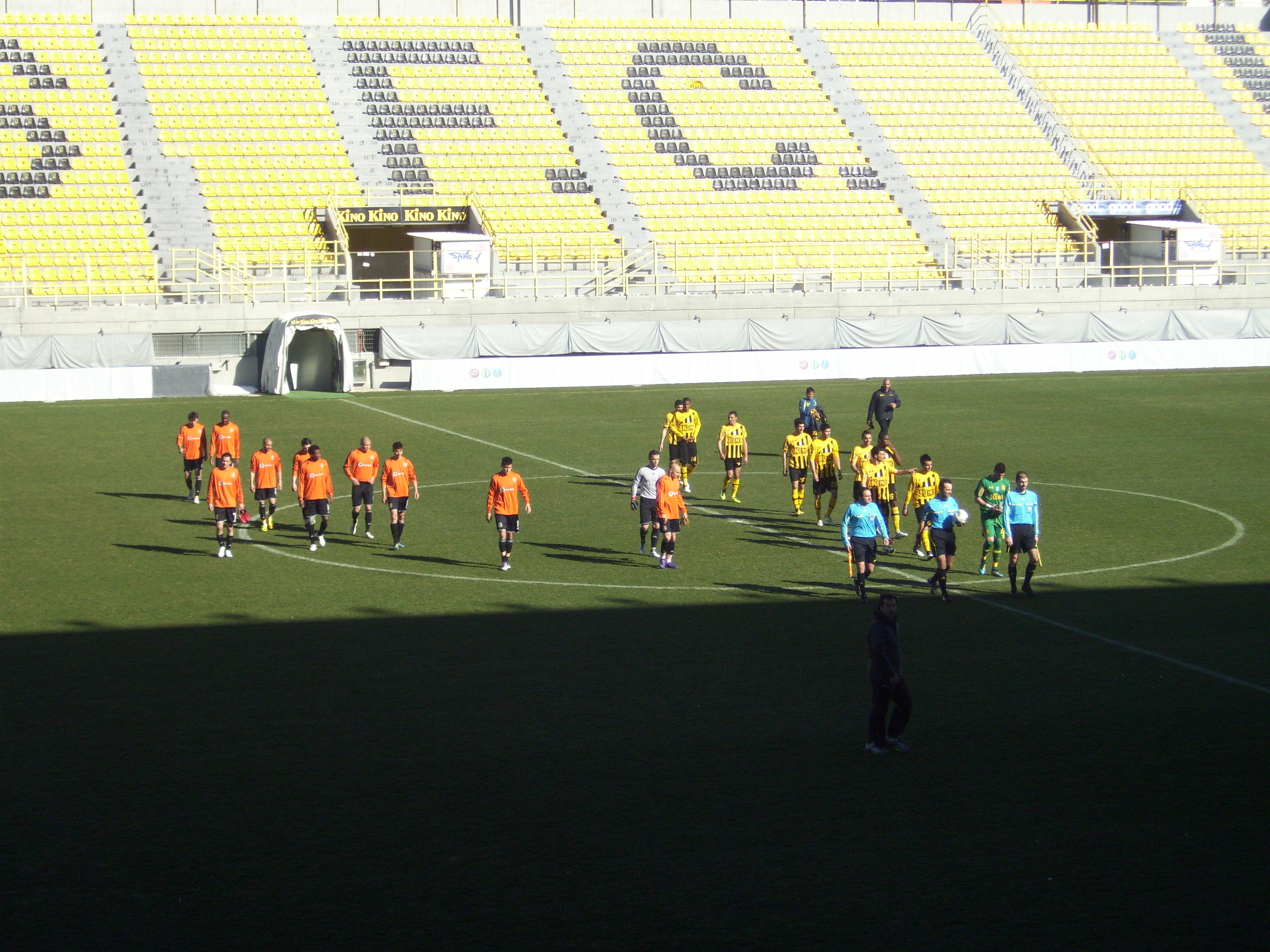 Entrata in campo dell'Aris Salonicco e del Litex Lovech